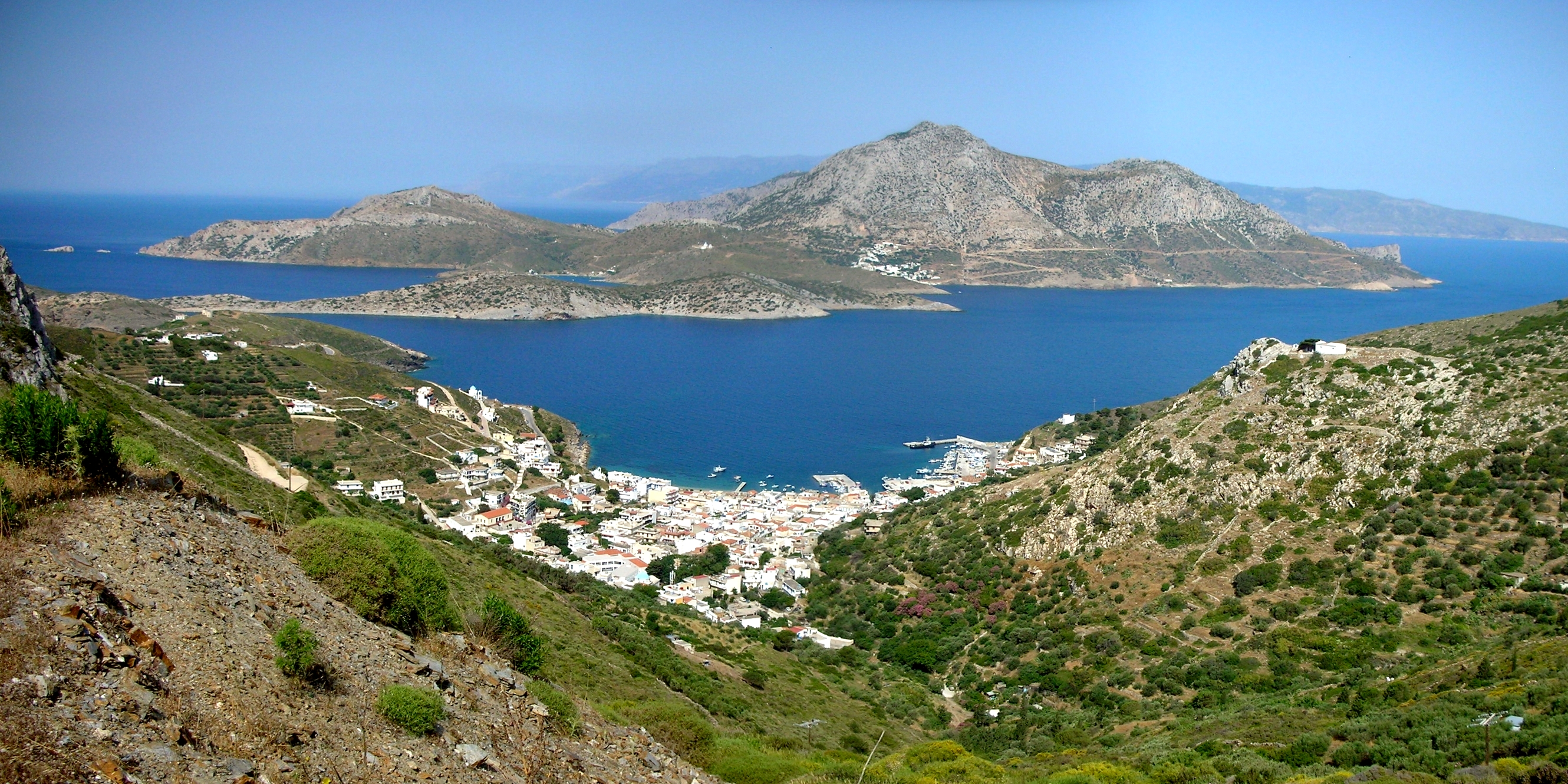 Insel Thymena mit Kisira (Fourni), im Vordergrund der Ort Fourni, im Hintergrund die Insel Ikaria